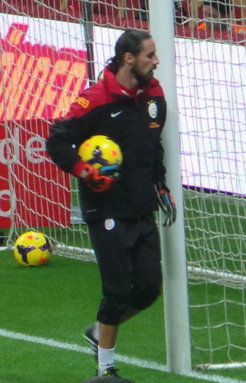 Aykut Erçetin before Sivasspor match